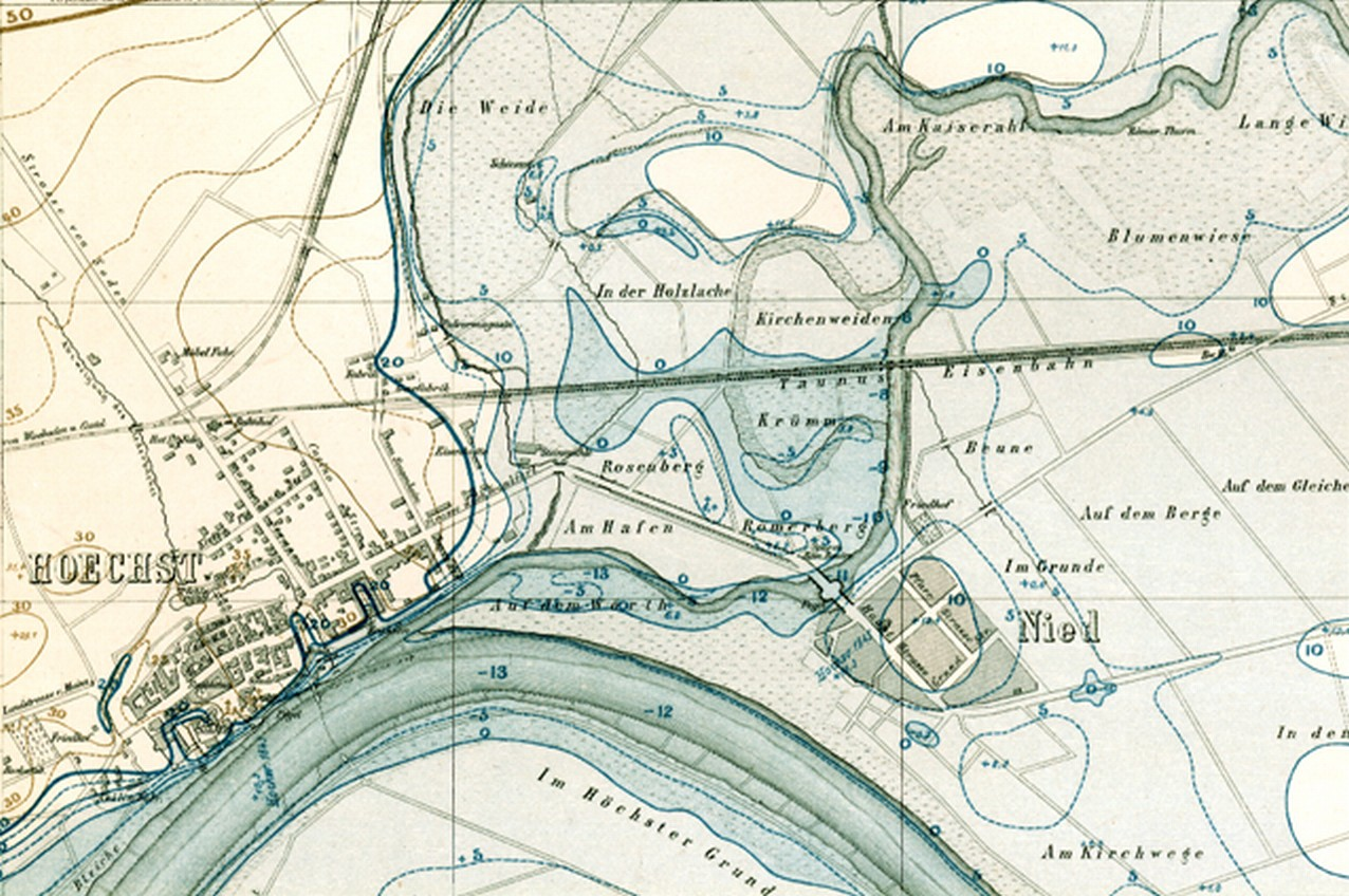 Höchst und Nied - Ausschnitt aus einem Hochwasserkataster des Jahres 1870